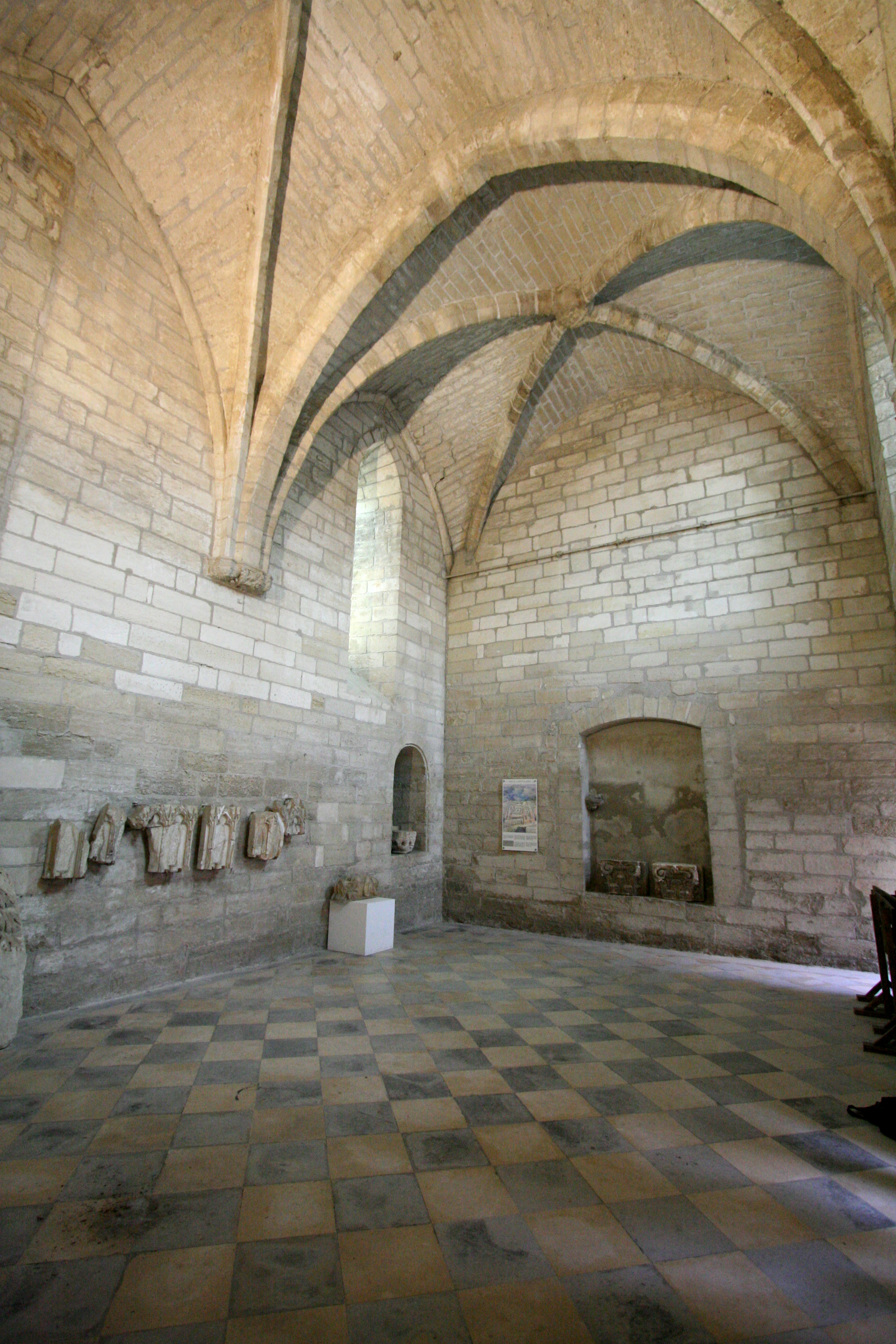 Salle du chapitre ou salle capitulaire de la chartreuse du Val de Bénédiction.